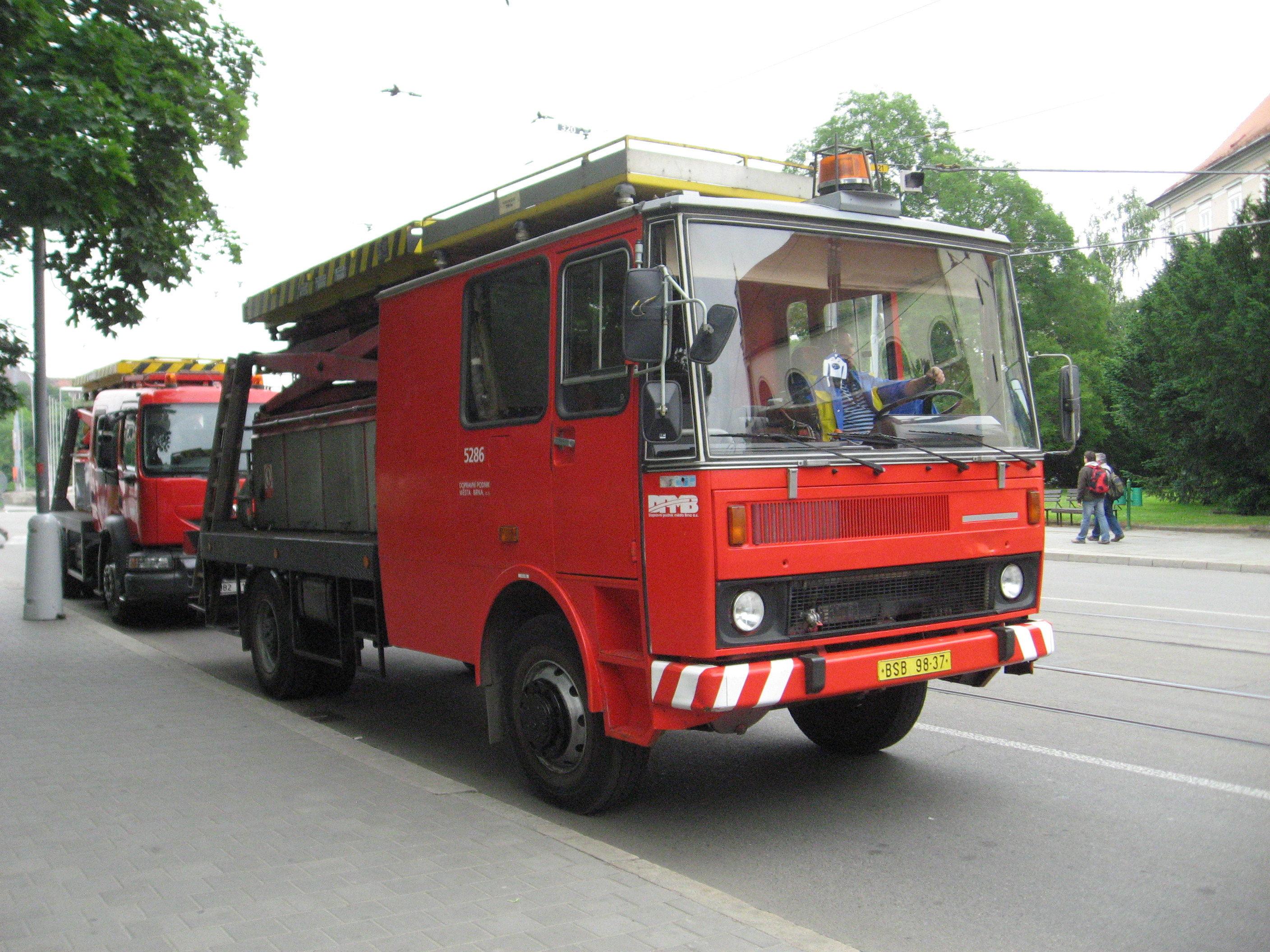 Brno, 140 let MHD